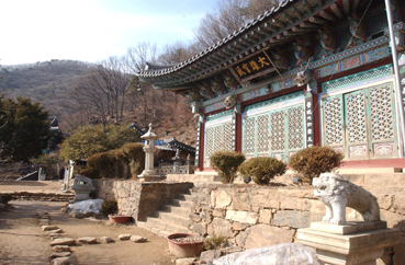 남양주 수종사 전경